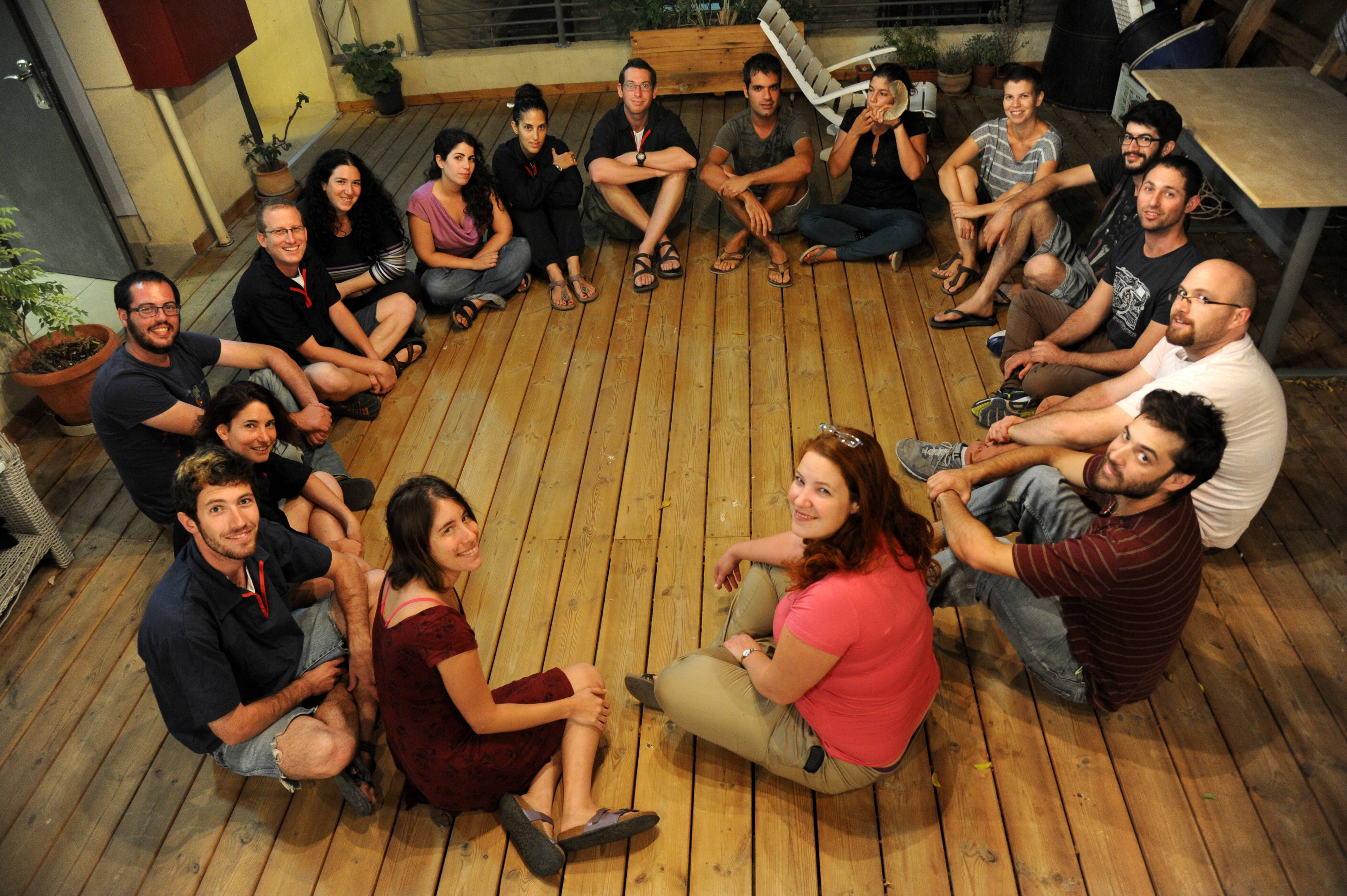 סוכות בקיבוץ המחנכים בבאר שבע